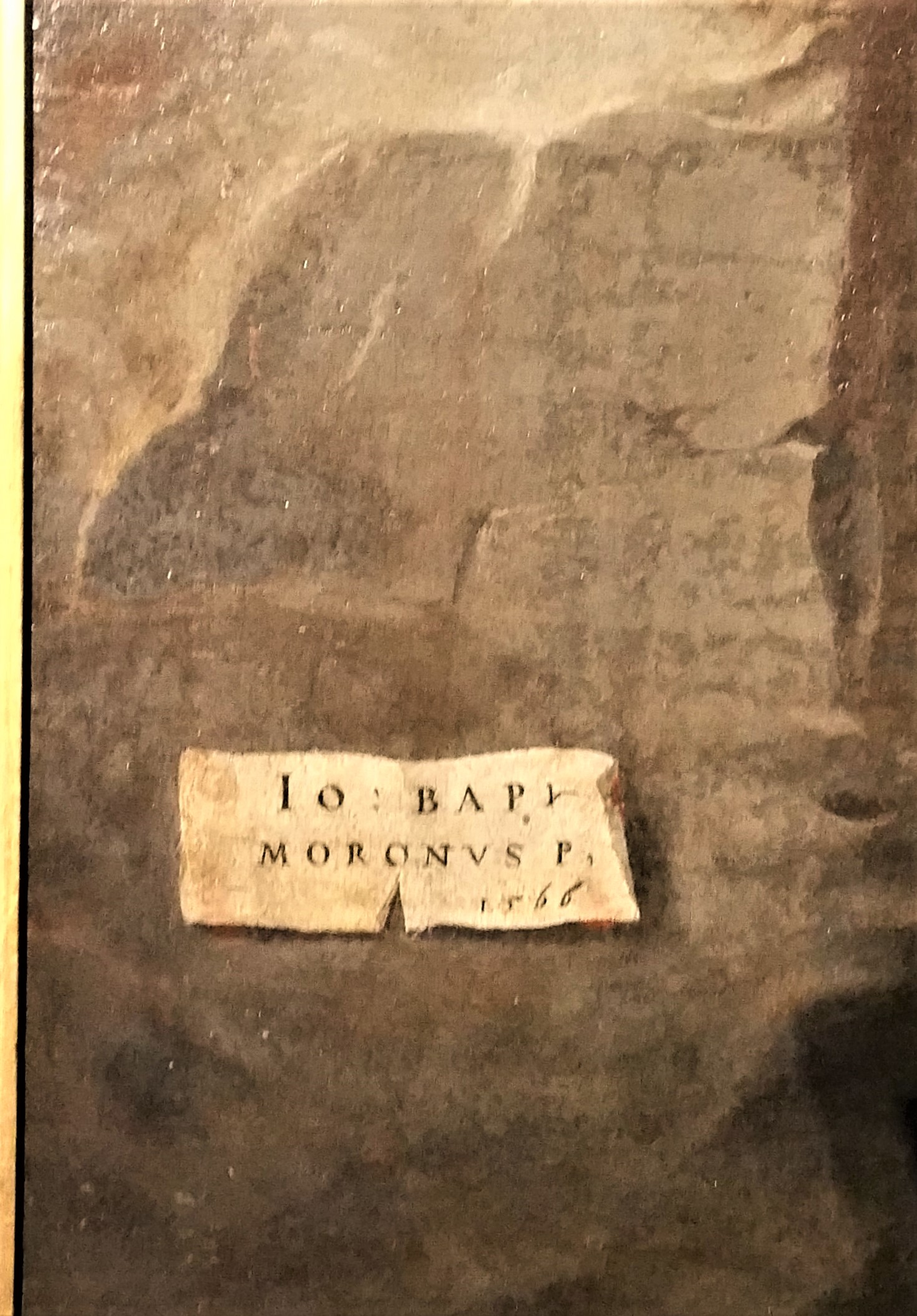 Finr e data sulla parte inferiore sinistra della tela dela Deposizione